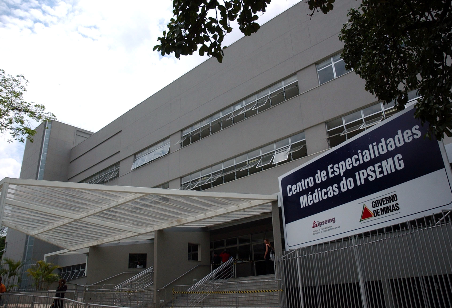 Belo Horizonte (MG) - Fachada do Centro Metropolitano de Especialidades Médicas. Foto: Fabio Rodrigues Pozzebom/Agência Brasil